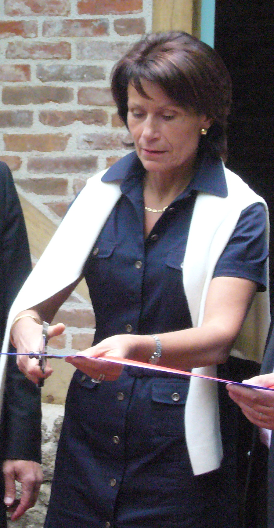 Marie-Françoise Pérol-Dumont, présidente du conseil général de la Haute-Vienne et députée PS, lors de l'inauguration du nouveau chalet du site Corot à Saint-Junien, (Haute-Vienne, France) le 10 juillet 2009